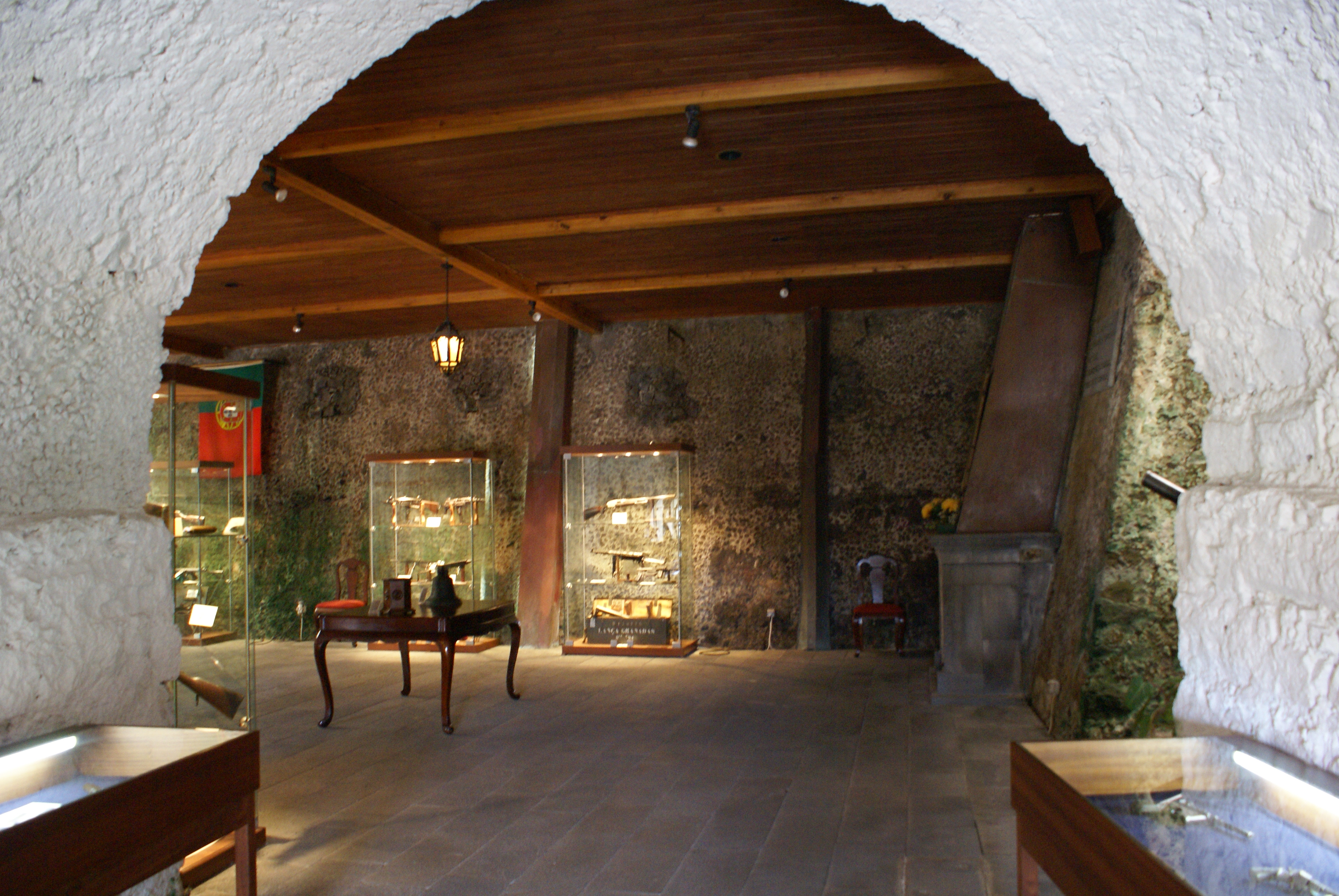 Forte de São Brás, Museu militar, Ponta Delgada, ilha de São Miguel, Açores